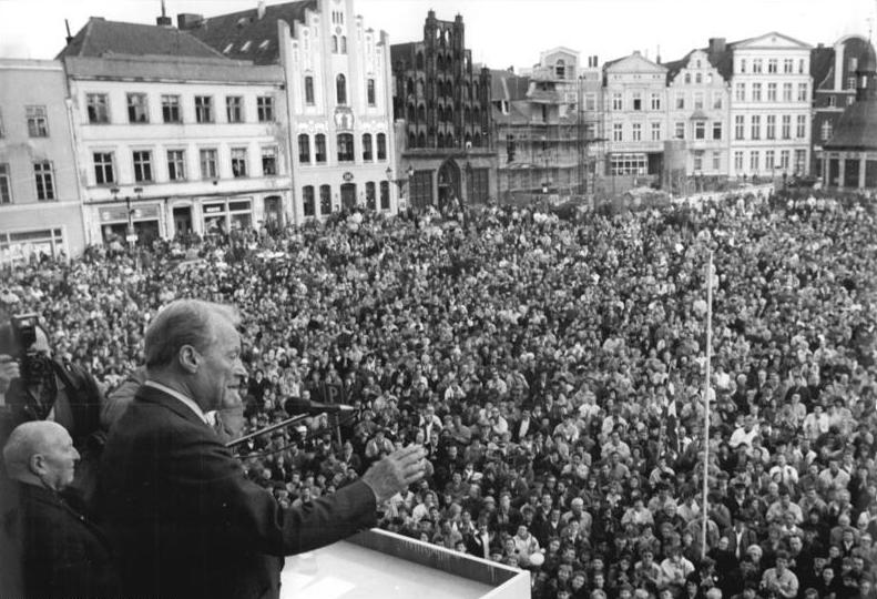 ADN-ZB-Sindermann-16.3.90 Wismar: Für eine neue deutsche Verfassung, die auf dem bewerten Grundgesetz der BRD aufbaue, hat sich der Ehrenvorsitzende der SPD beider deutschen Staaten, Willy Brandt, ausgesprochen. Auf einer Kundgebung in Wismar, mit der die SPD den Endspurt ihres Wahlkampfes im Norden der DDR einleitete, sprach er vor rund 30 000 Besuchern.